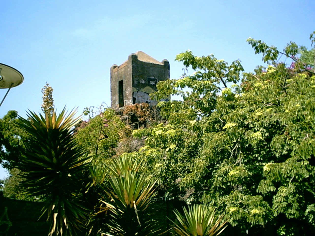 Vedetta saracena a Catania